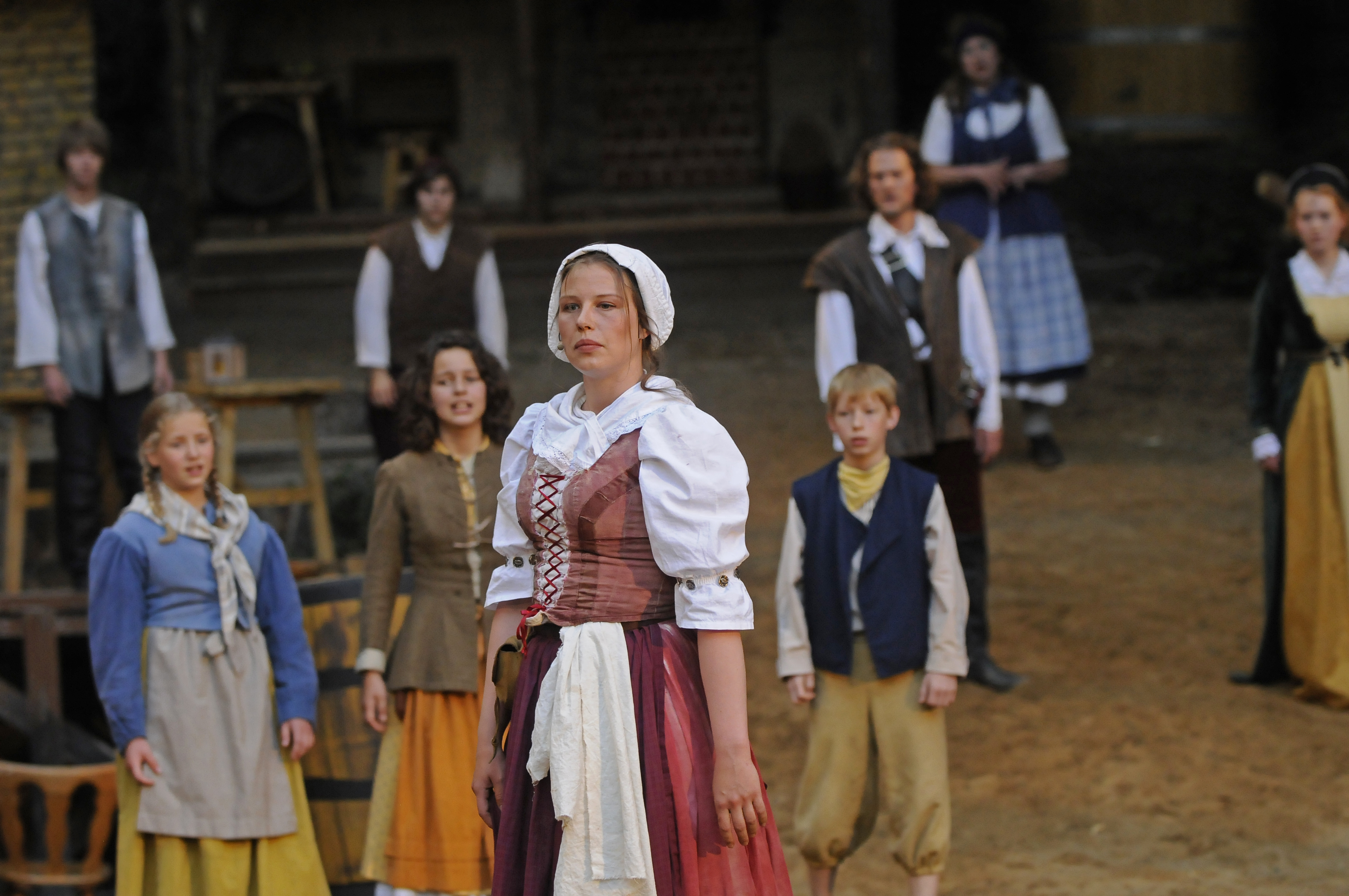 Cathrein Unger, Müritz-Saga, Freiluftbühne Waren (Müritz)